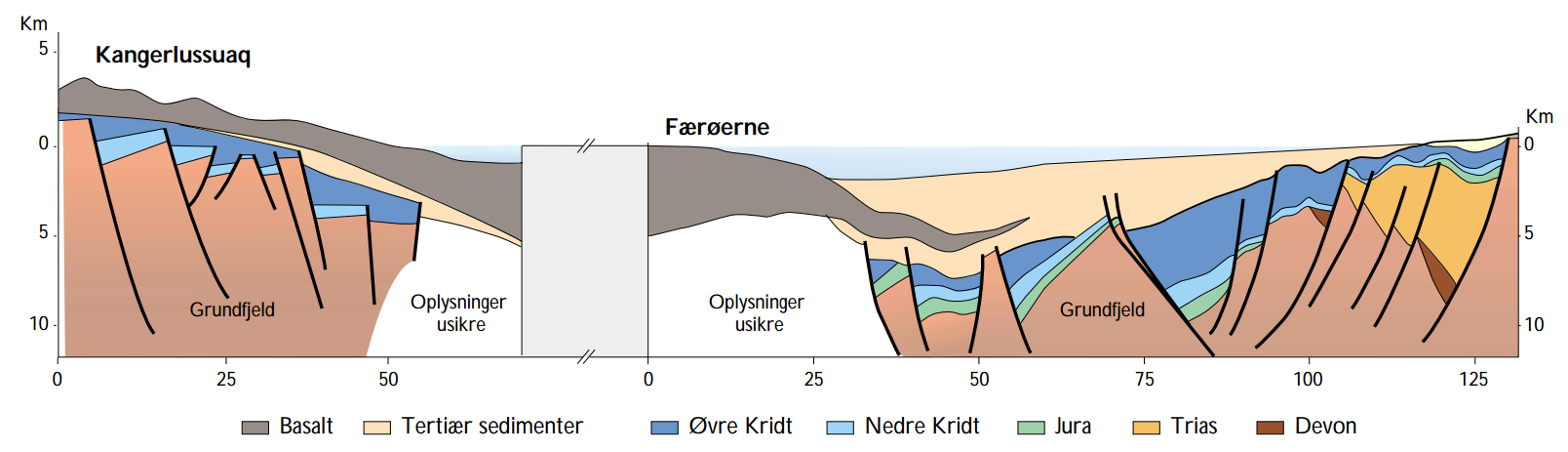 Sammenligning af færøsk og østgrønlandsk sokkelområde.